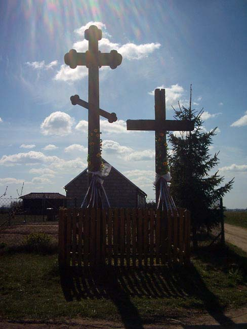 Krzyże na początku wsi Postołowo – wieś w Polsce położona w województwie podlaskim, w powiecie hajnowskim, w gminie Hajnówka.